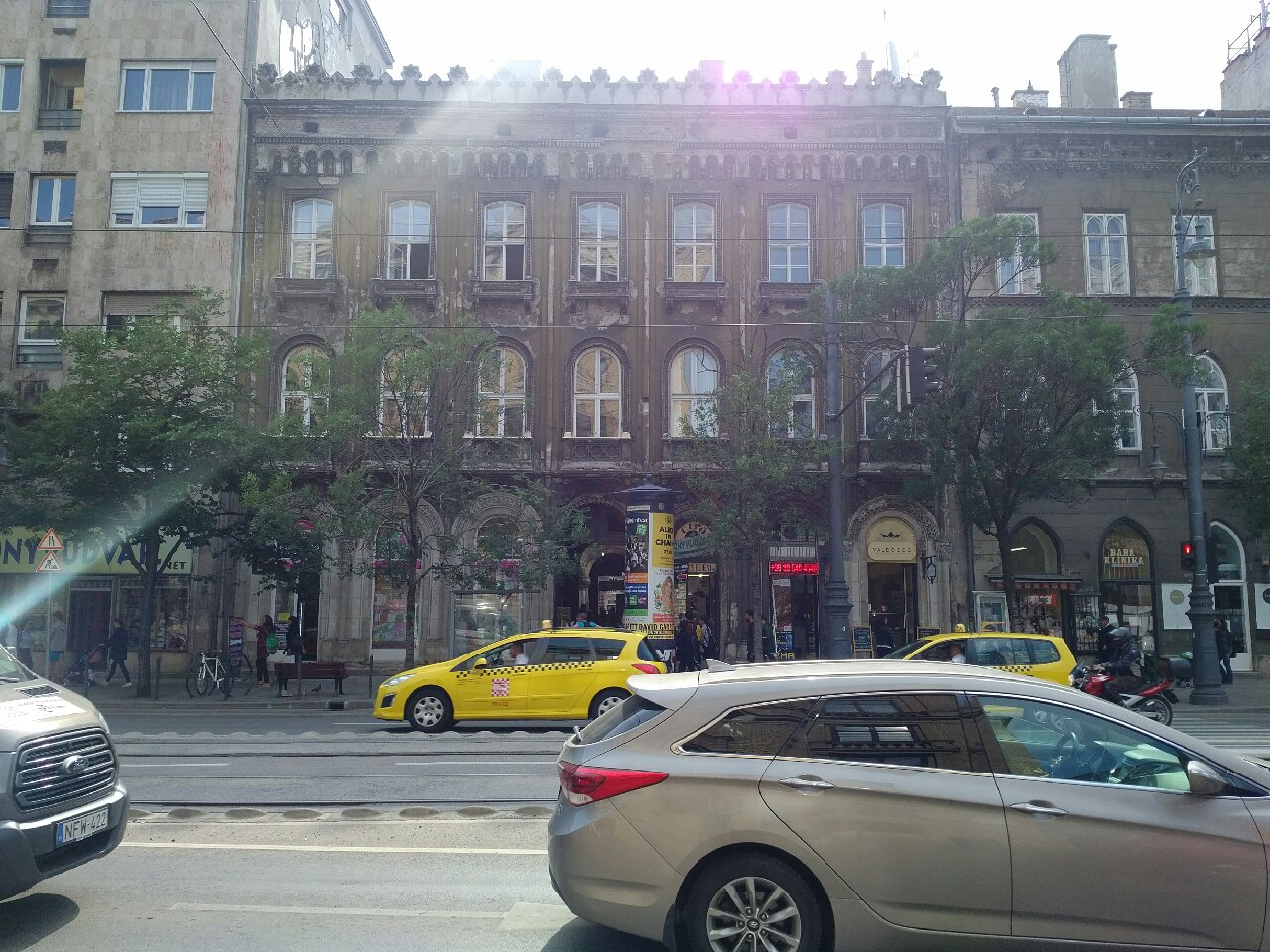 Az Unger-ház Múzeum körúti homlokzata, a Múzeum körút túloldaláról fényképezve.